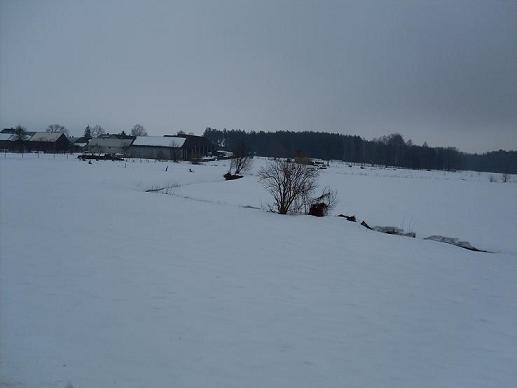 Miejscowość Olszewo, woj. podlaskie, powiat Bielsk Podlaski, gmina Boćki